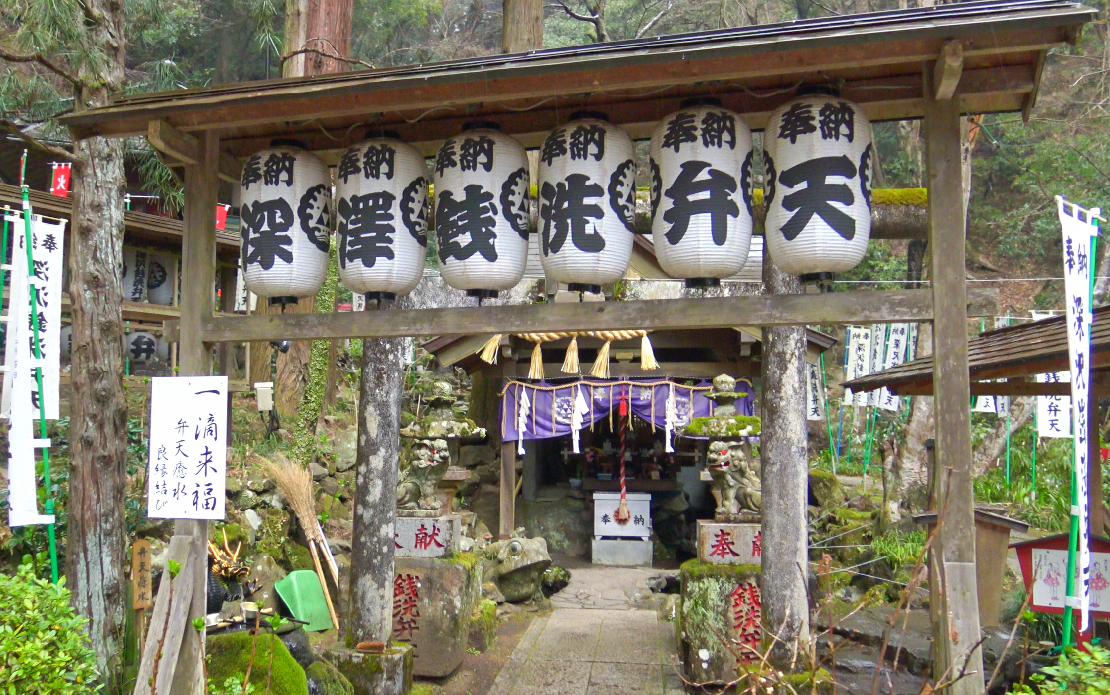 塔ノ沢駅 銭洗弁天（2015年3月16日）